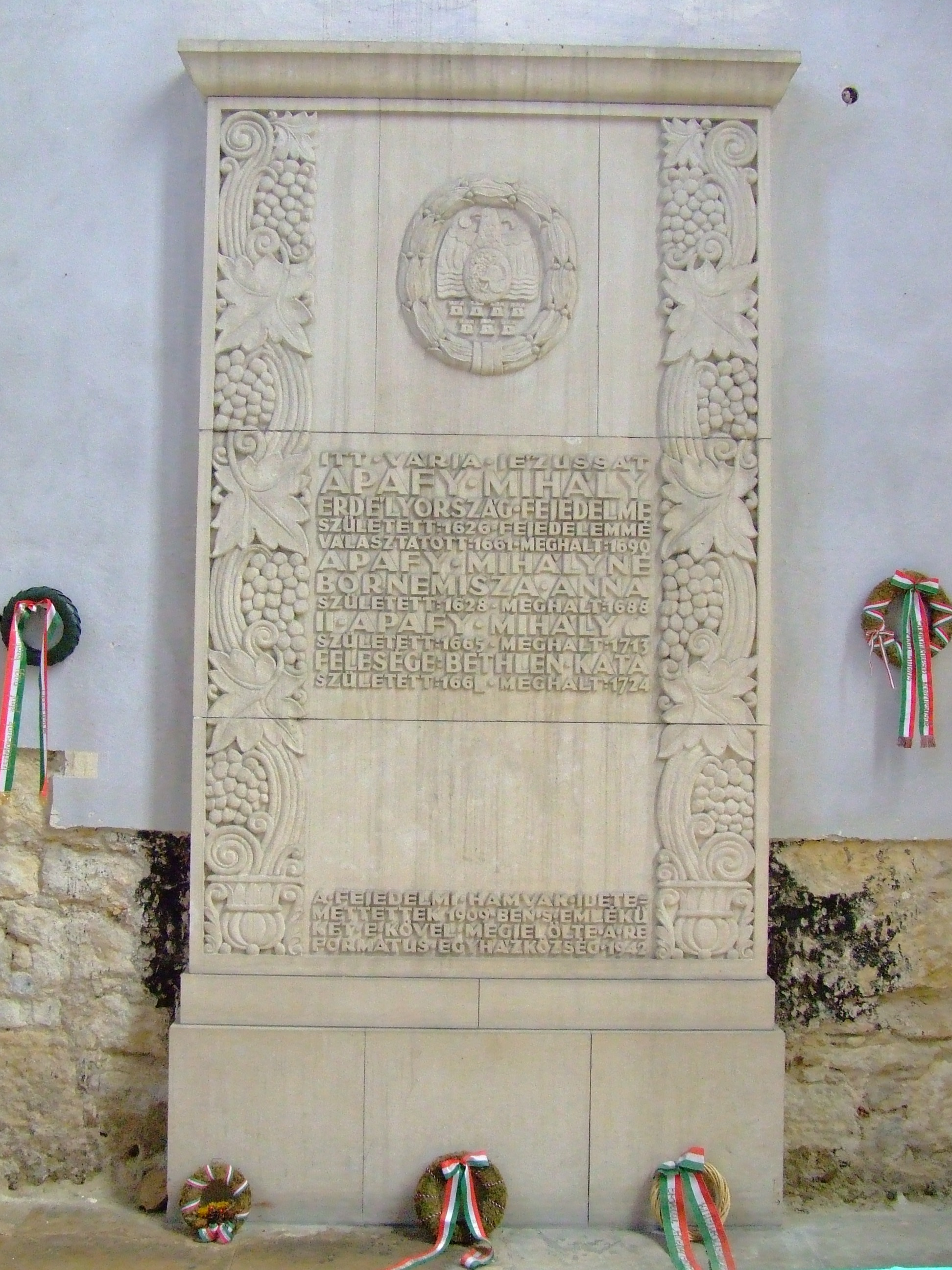 Cluj-Napoca, Mormintele unor personalităţi în Biserica Reformată-Calvină din str. M.Kogălniceanu nr.21